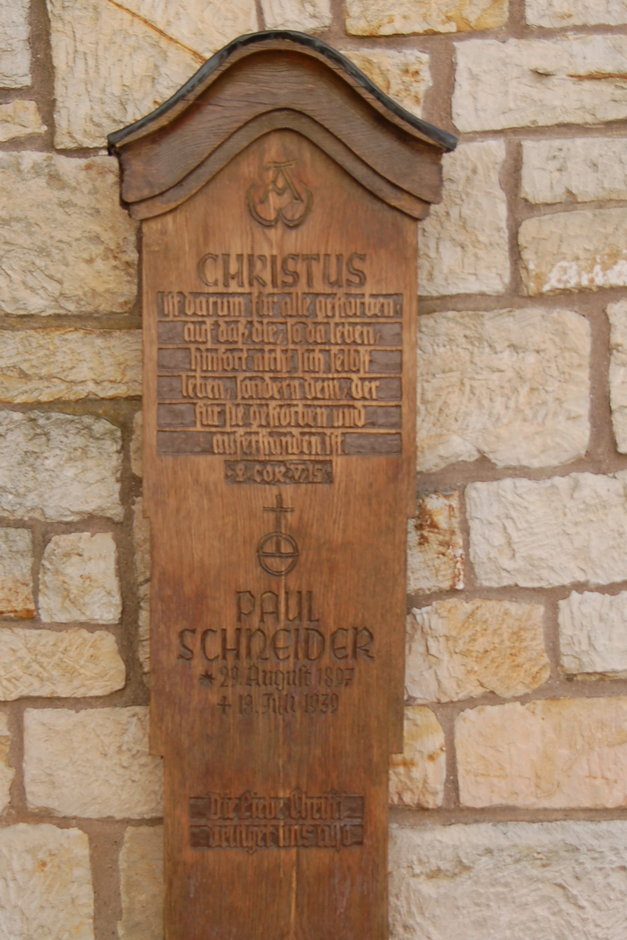 =Die ursprüngliche Grabstele von Paul Schneider, angefertigt vom Wilhelm Groß. Sie befindet sich heute in der evangelischen Kirche von Dickenschied.